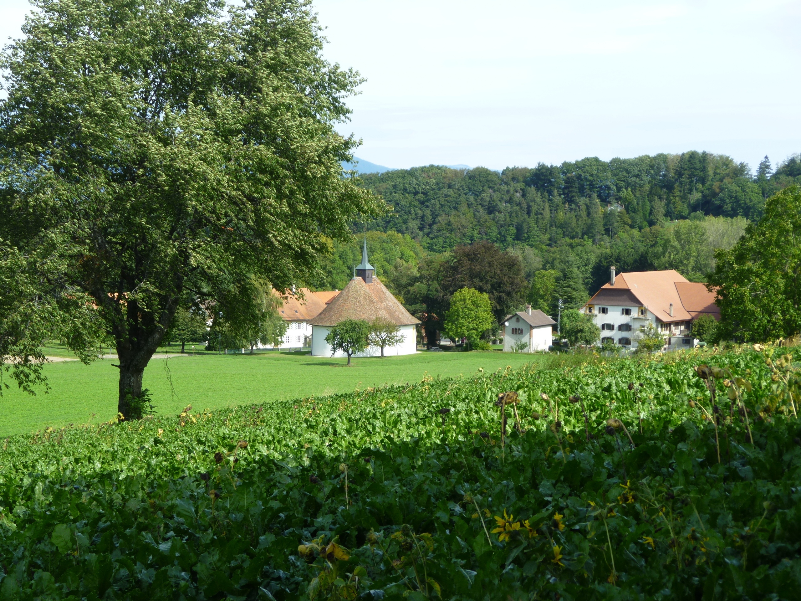 Ovale Kirche in Chene-Paquier gebaut 1667